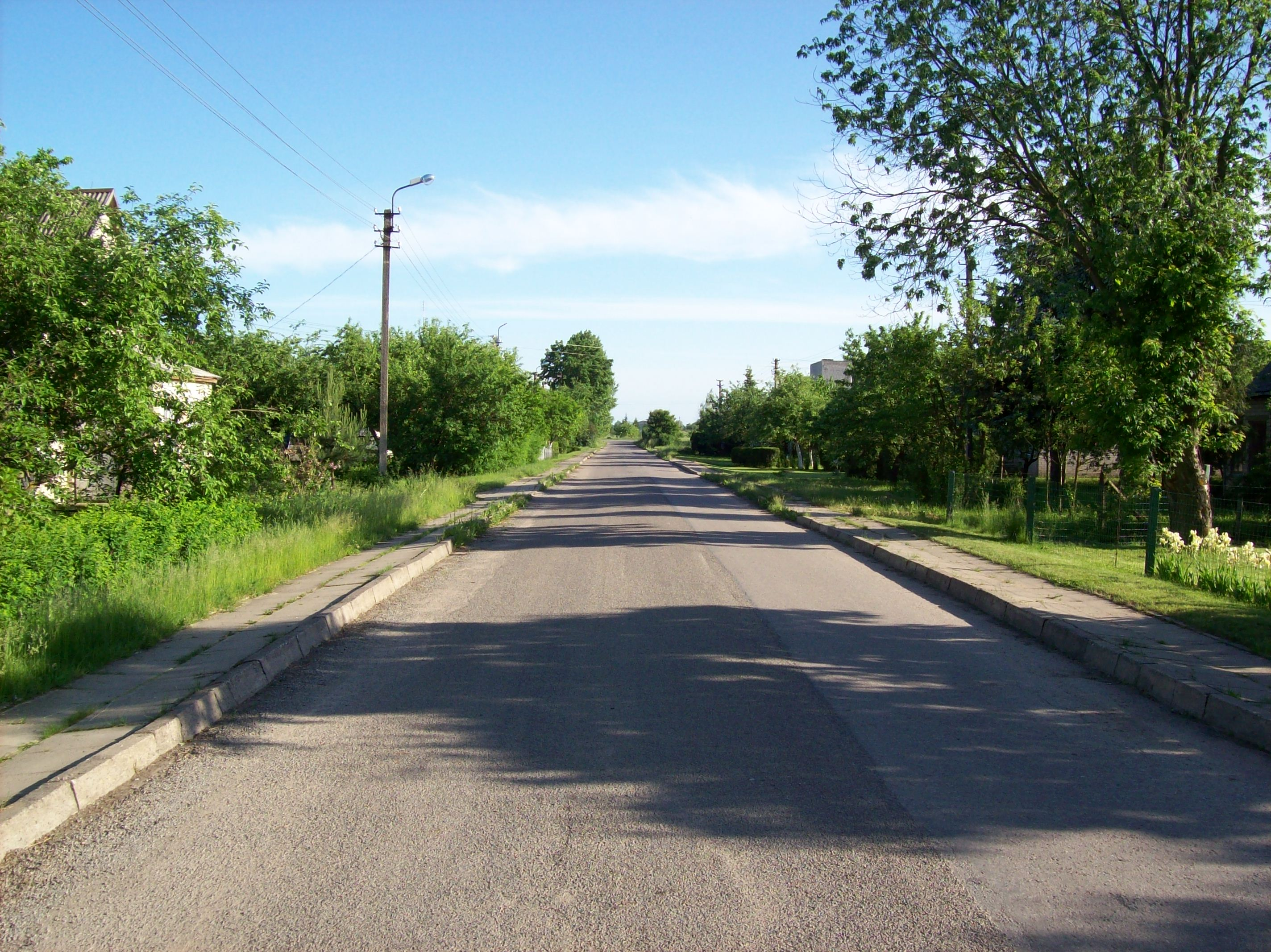 Garuckai – gyvenvietė Panevėžio rajone.